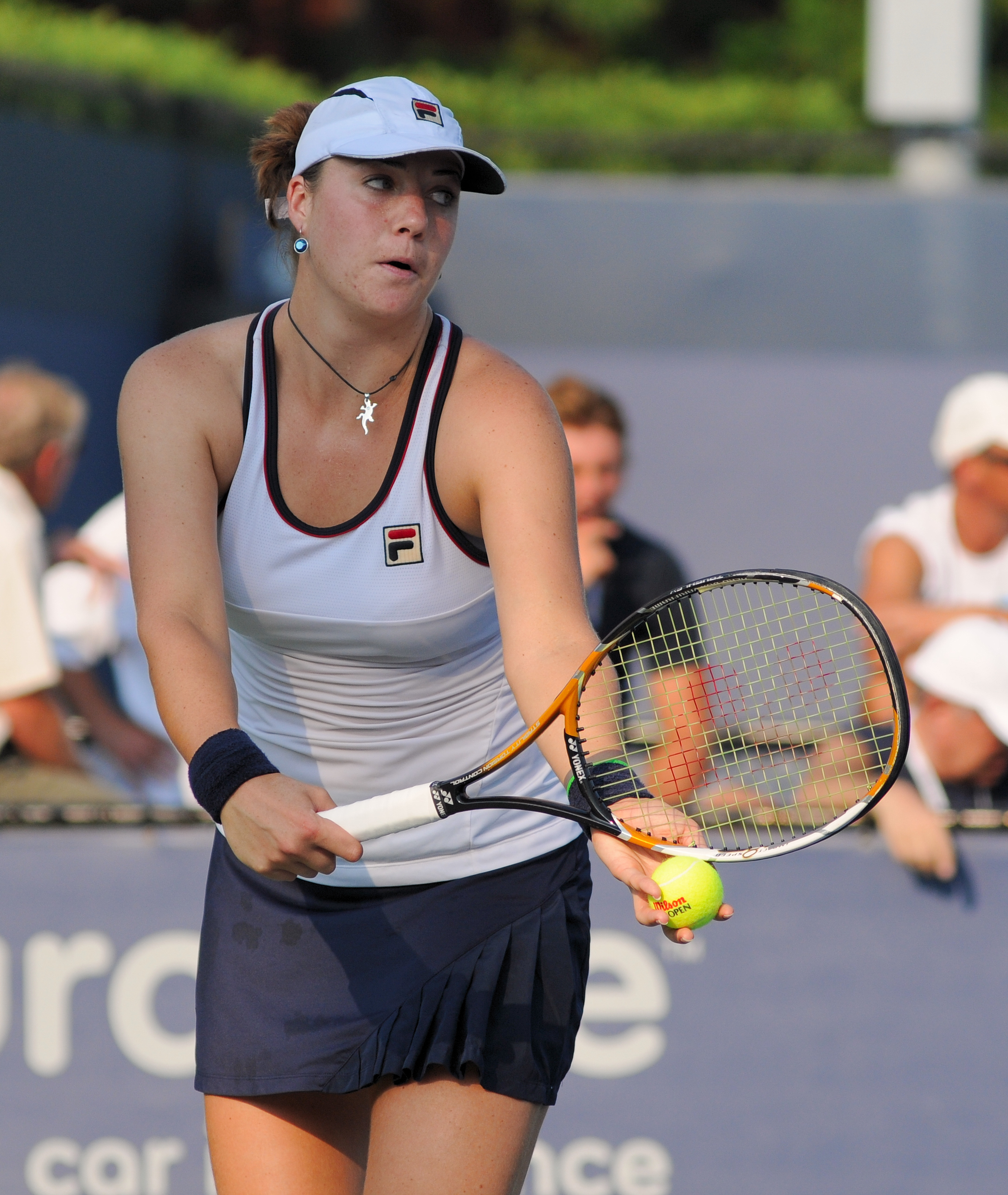 Alisa Kleybanova - US Open 2010